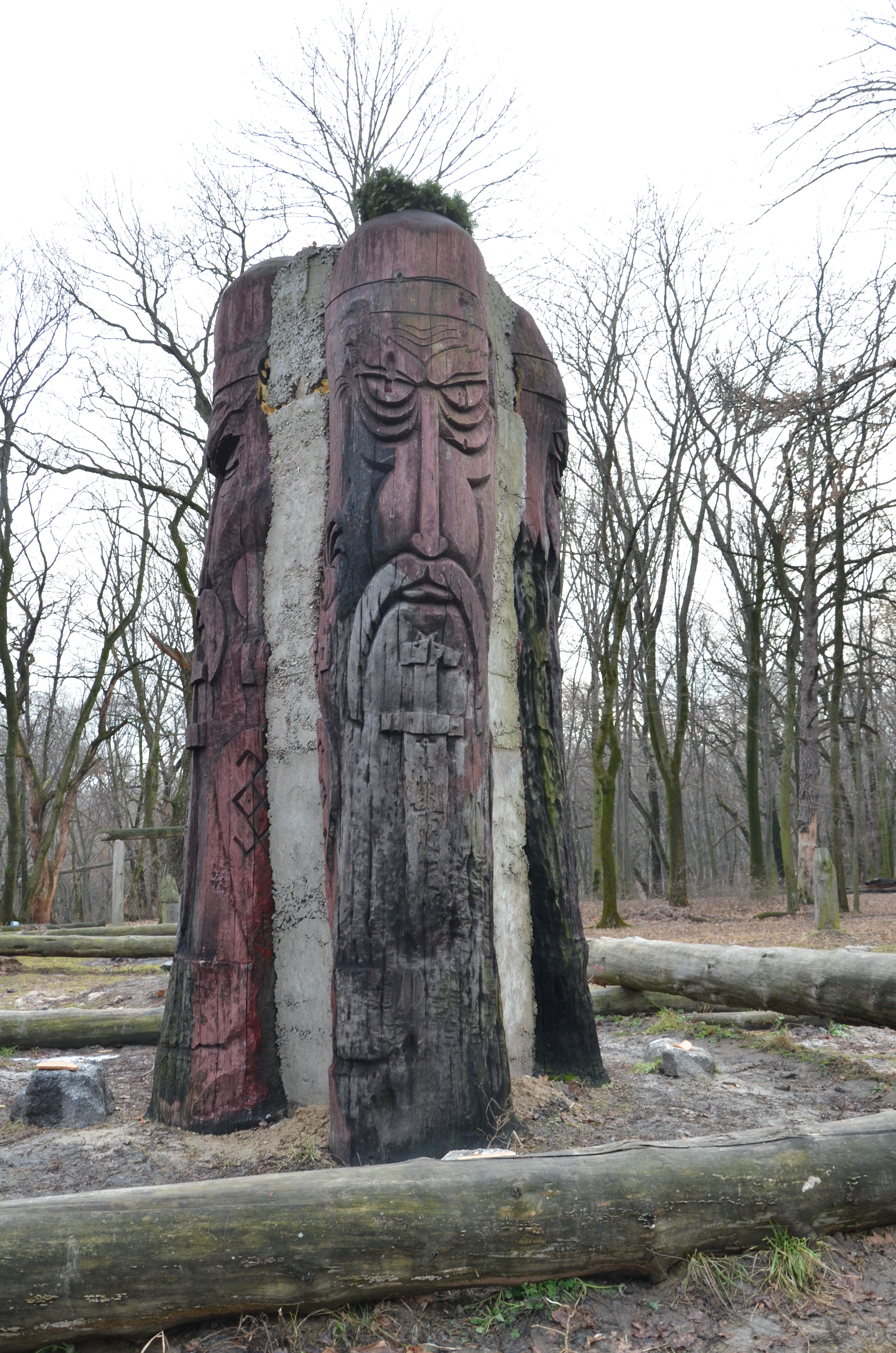 «Лиса Гора», Голосіївський район